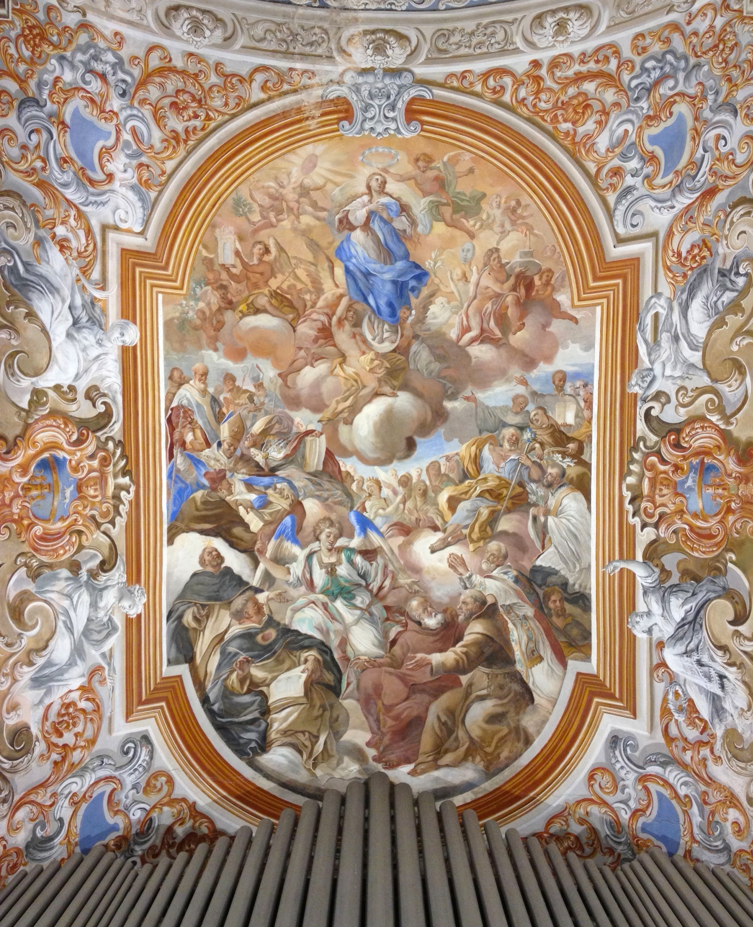 Affresco presente nella volta del coro della Chiesa del Convento della SS.ma Trinità di Baronissi. Soggetto: Gloria dell'Immacolata. Autore: Michele Ricciardi. Anno: 1708-09.